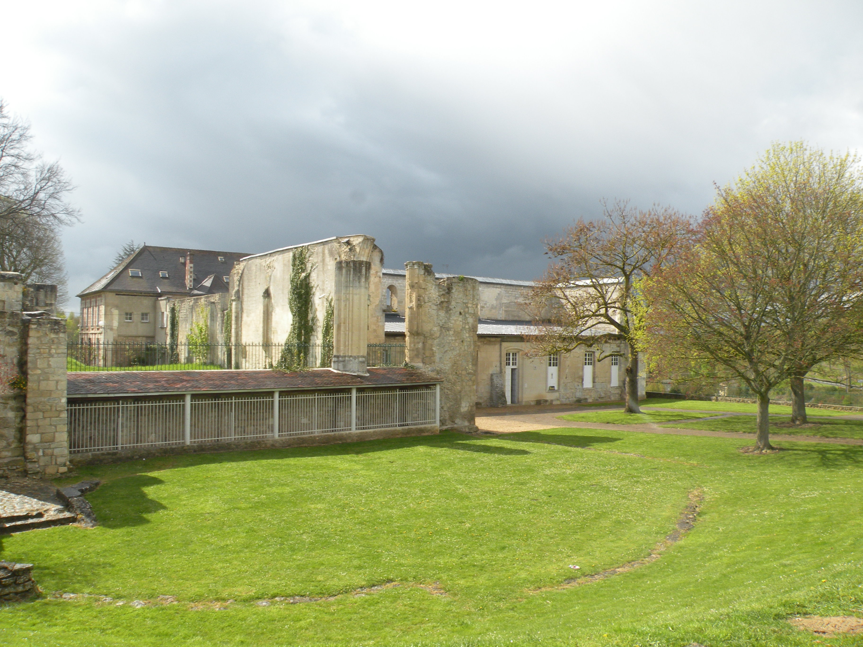 Abbaye Saint-Arnould, Crépy-en-Valois